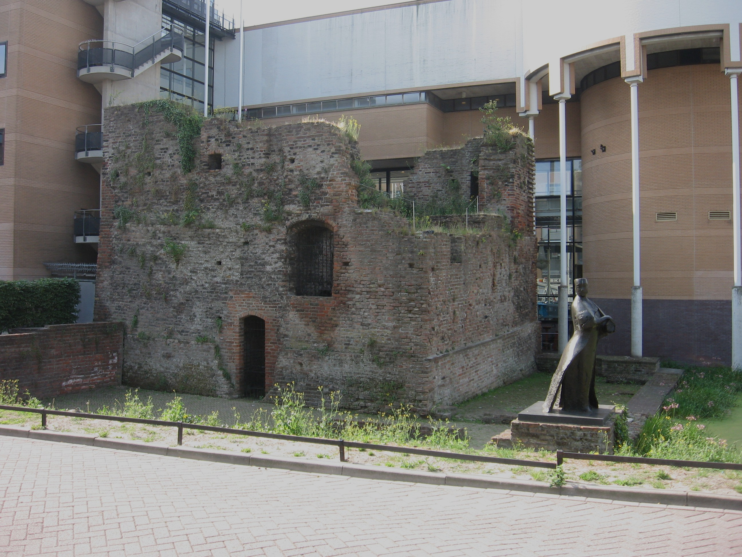 Schiedam - Huis te Riviere 1 002.jpg, rijksmonument